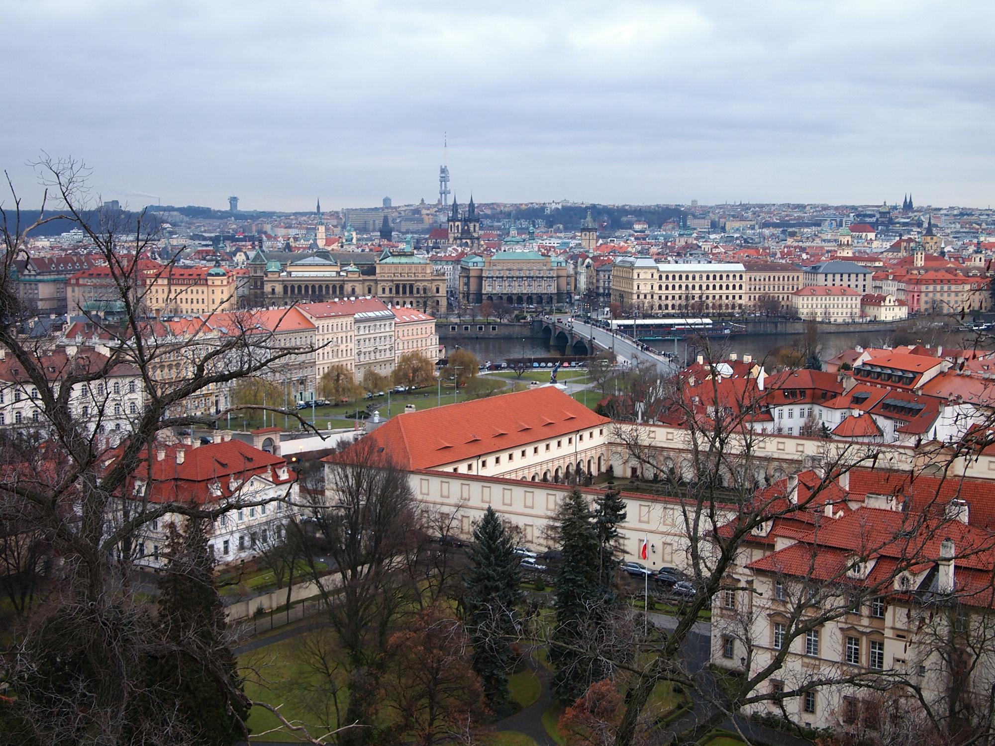 Беларуская (тарашкевіца): Погляд на стары горад Прагі